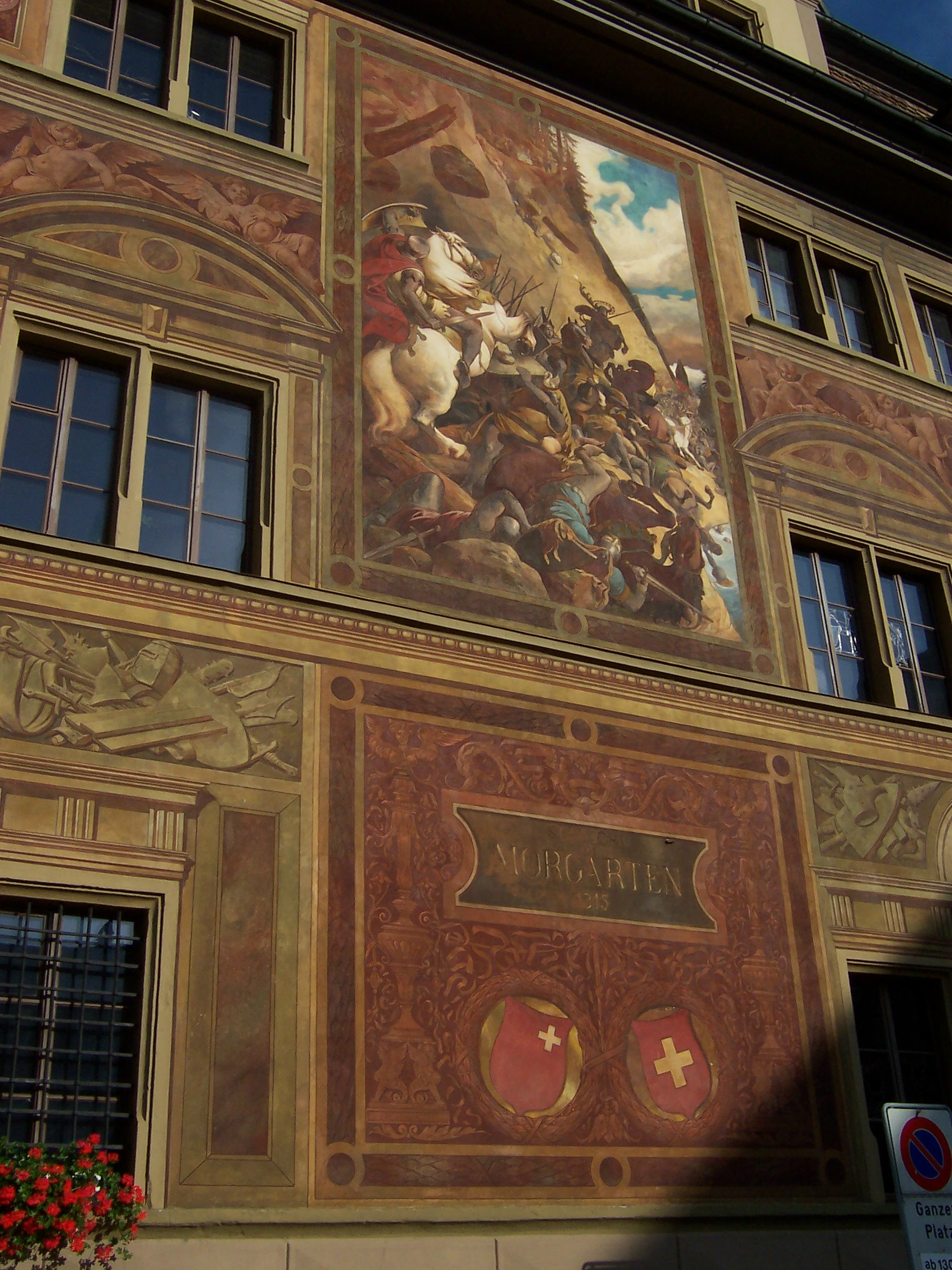 Schwyz, Rathaus am Hauptplatz